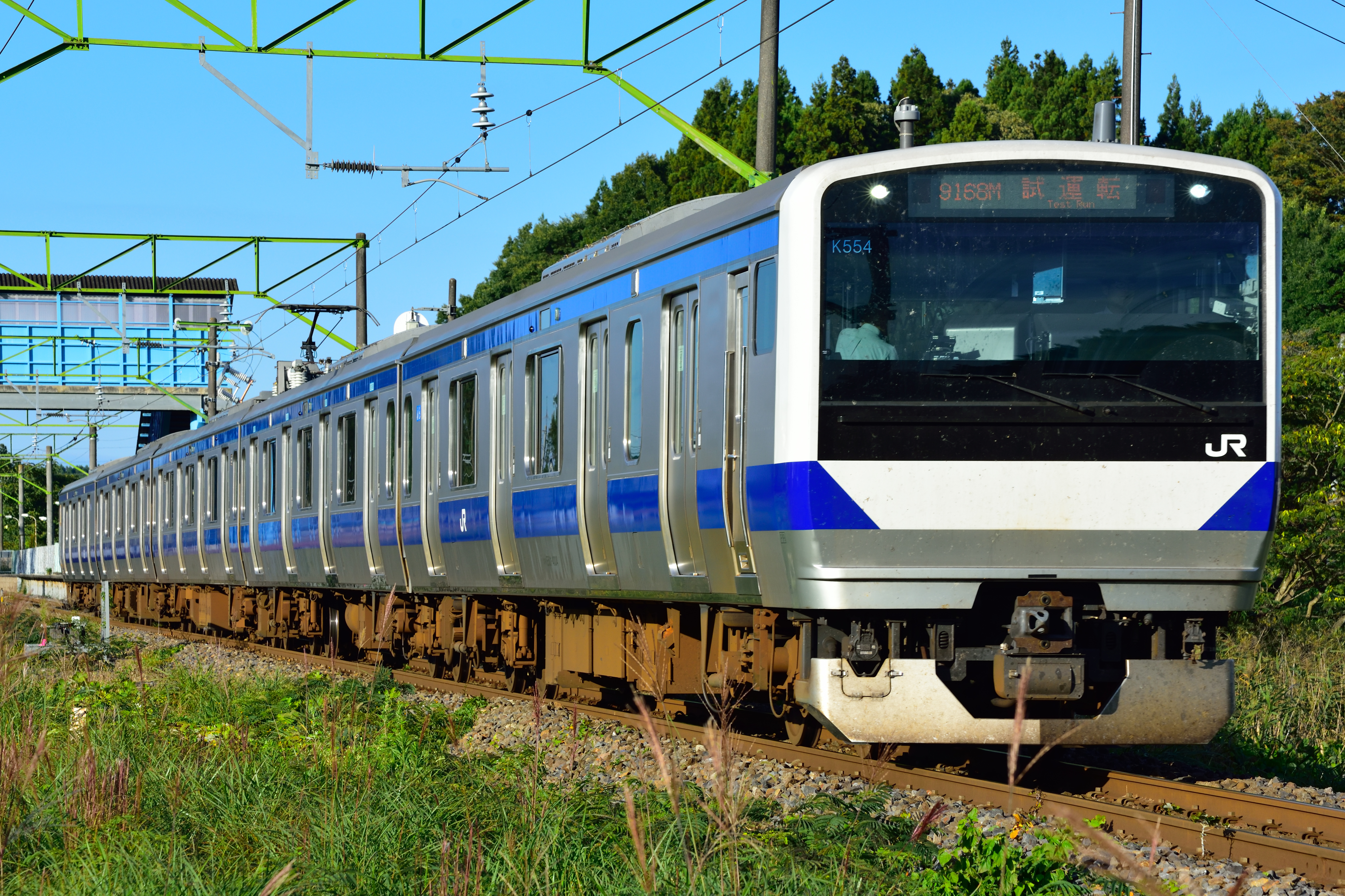 E531系。東北本線試運転。白坂駅付近。